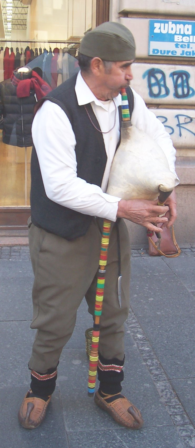 A Serbian bagpipe player. Photo © 2005 by Nikola Smolenski. Shot at Knez Mihajlova street, Belgrade.